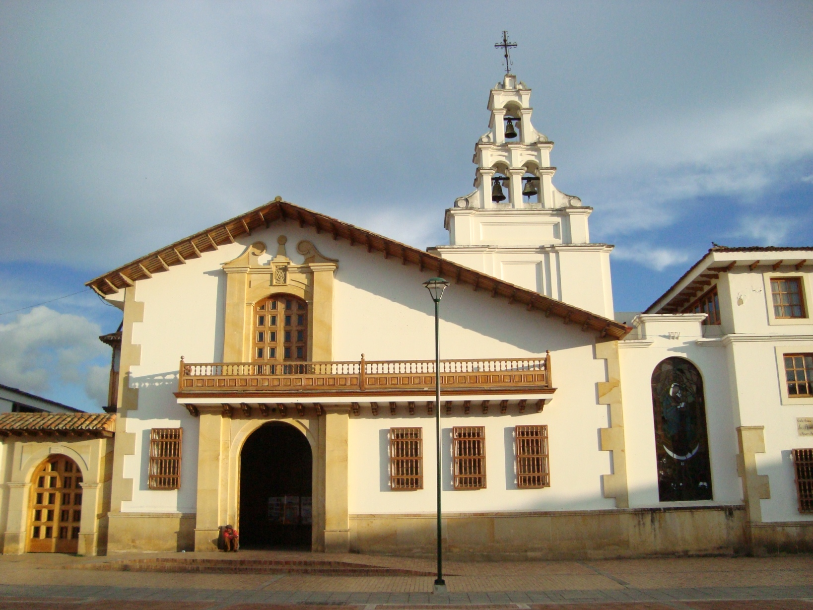 Iglesia de la renovación en el parque Julio Florez de la ciudad de Chiquinquirá